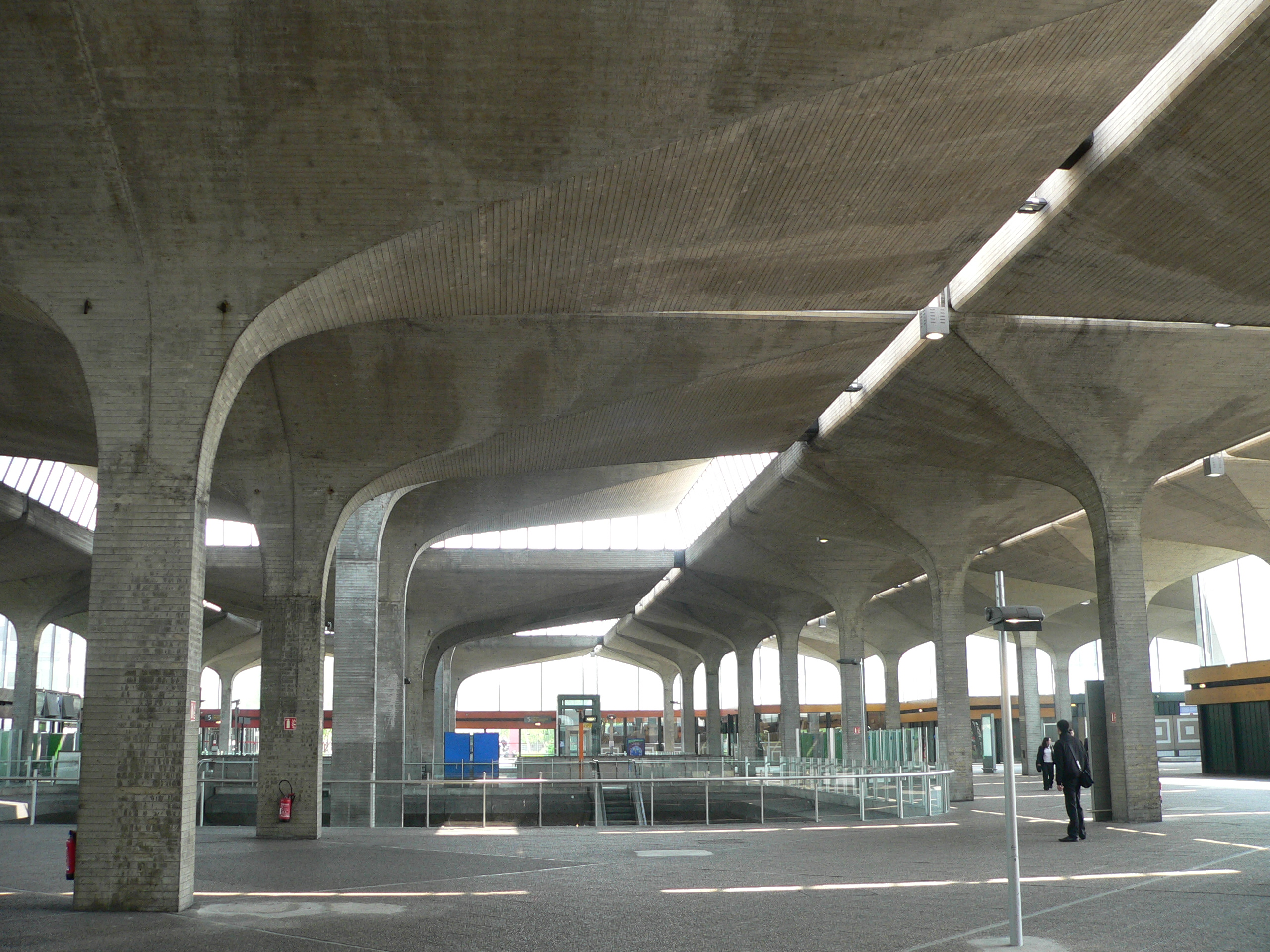 Charles de Gaulle International Airport: RER B station "Aéroport Charles de Gaulle 1" - Roissypôle